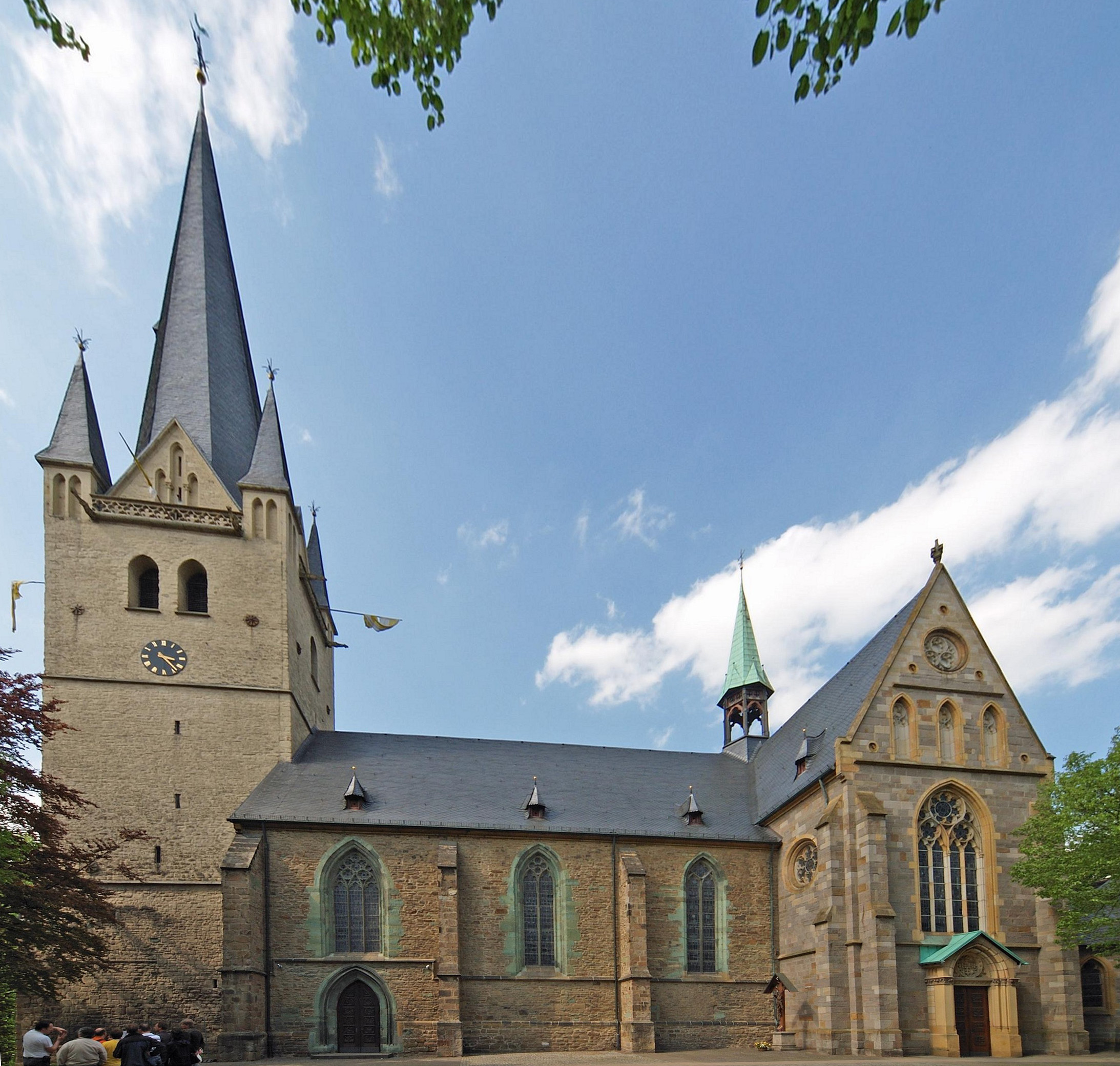 Die Südseite der Kirche St. Vinzenz in Menden (etwas entzerrte Version)